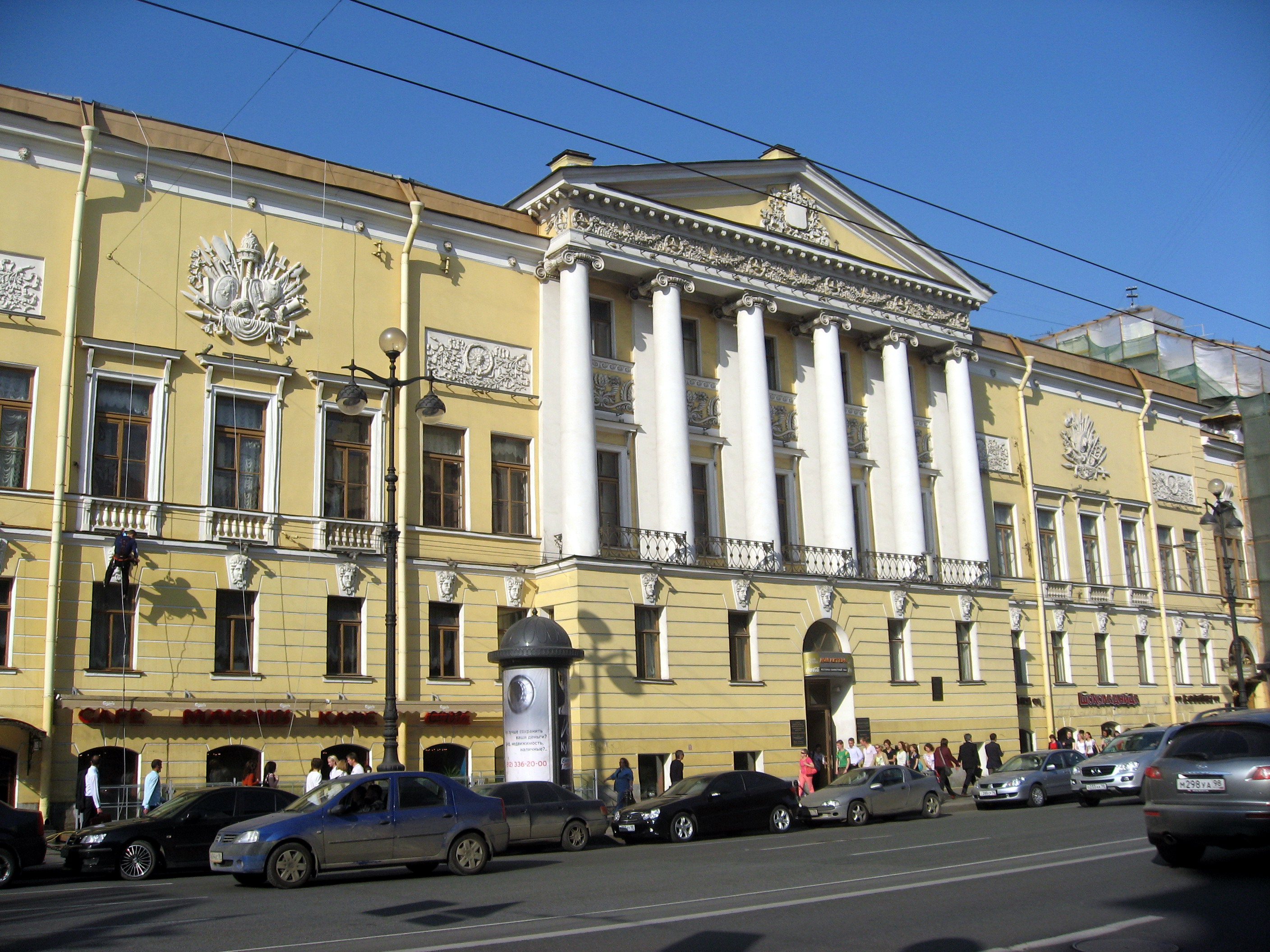 Дом актёра (Невский пр., 8684), бывший особняк З. Н. Юсуповой. Построен в 1822—23 по проекту М. А. Овсянникова для полковника Ф.Н. Петрово-Соловово, перестроен в 1835 по проеекту Г. Фоссати для графа Браницкого